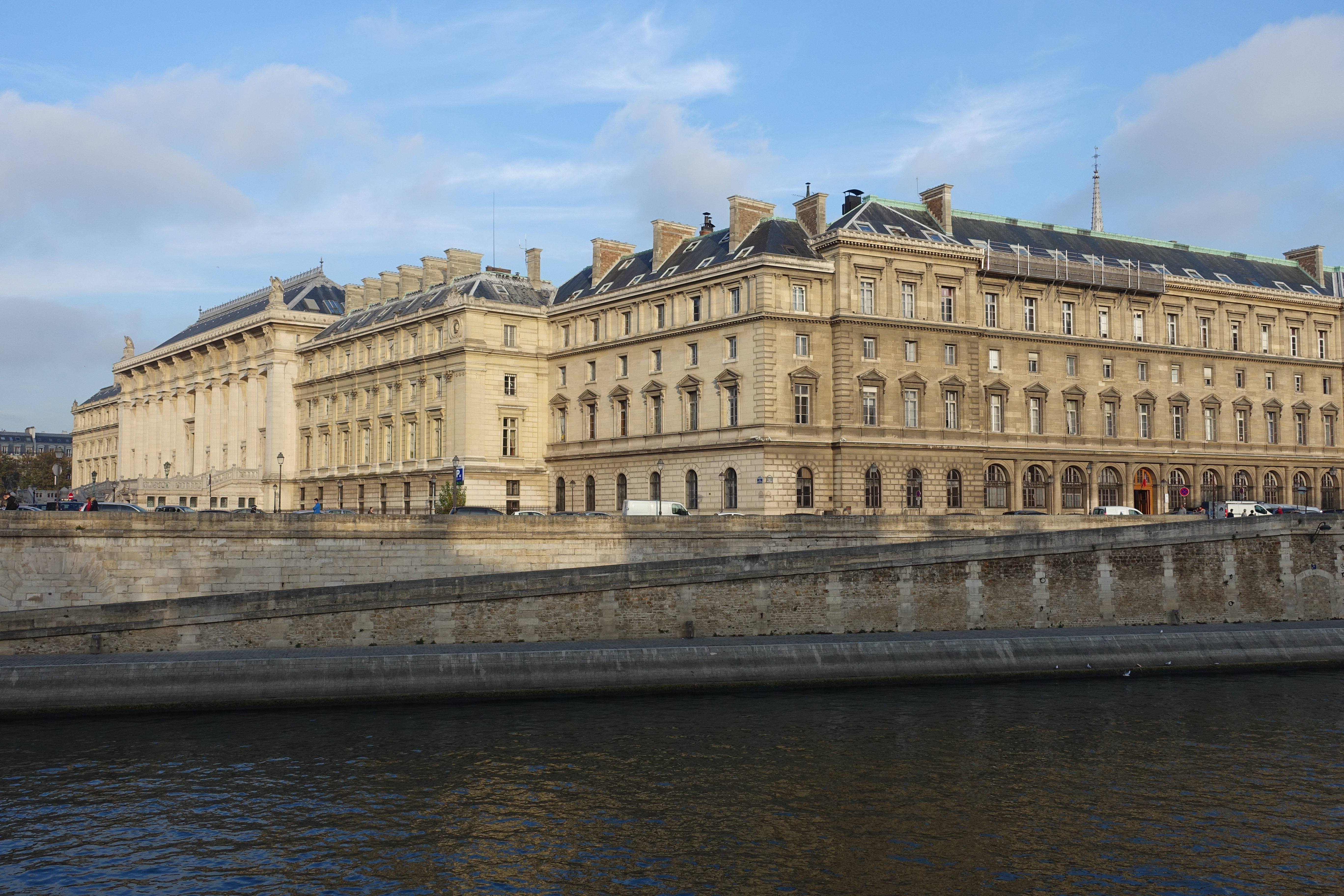 Ile de la Cité @ Seine @ Paris